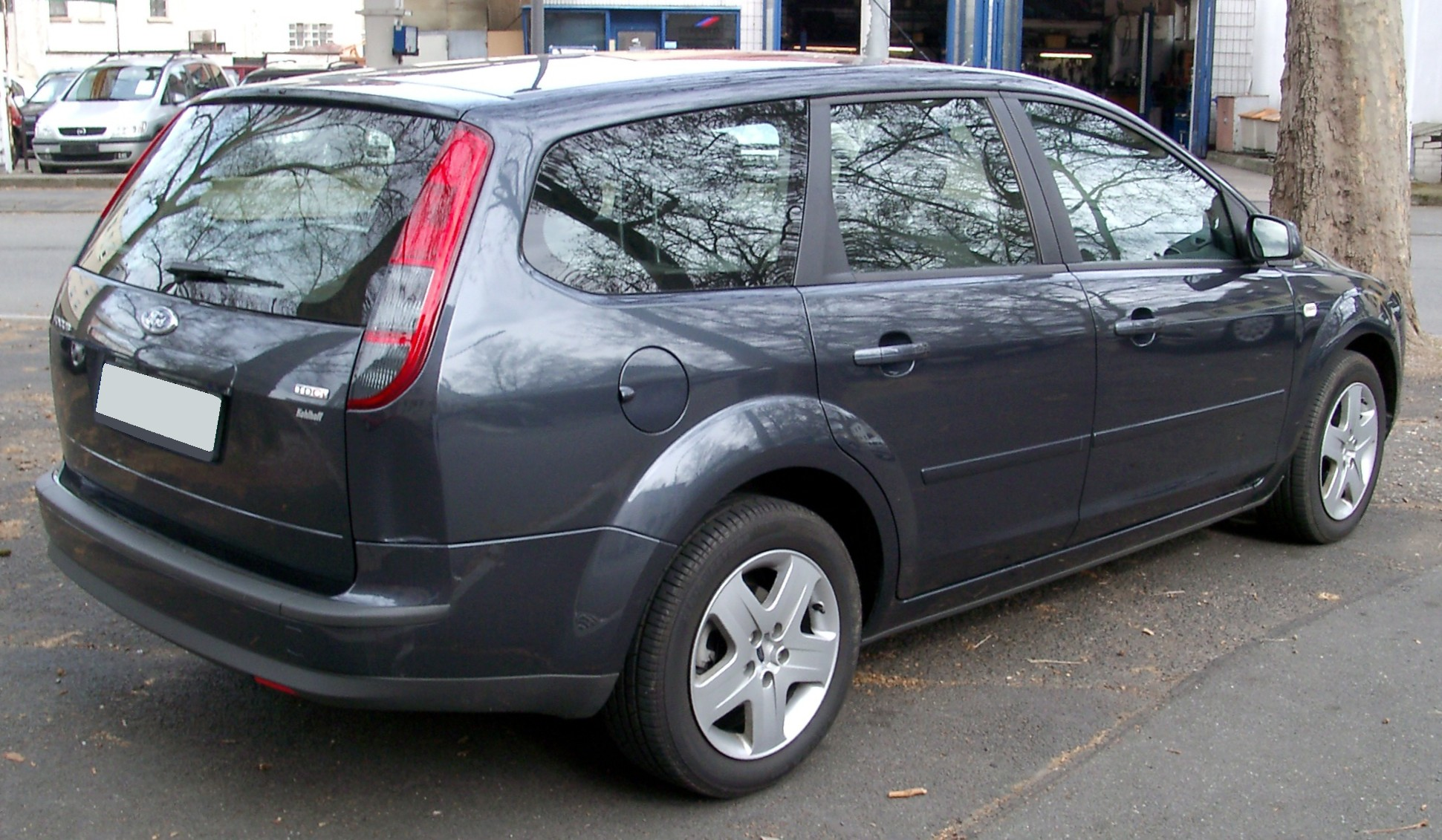 Ford Focus Kombi, 2. Generation